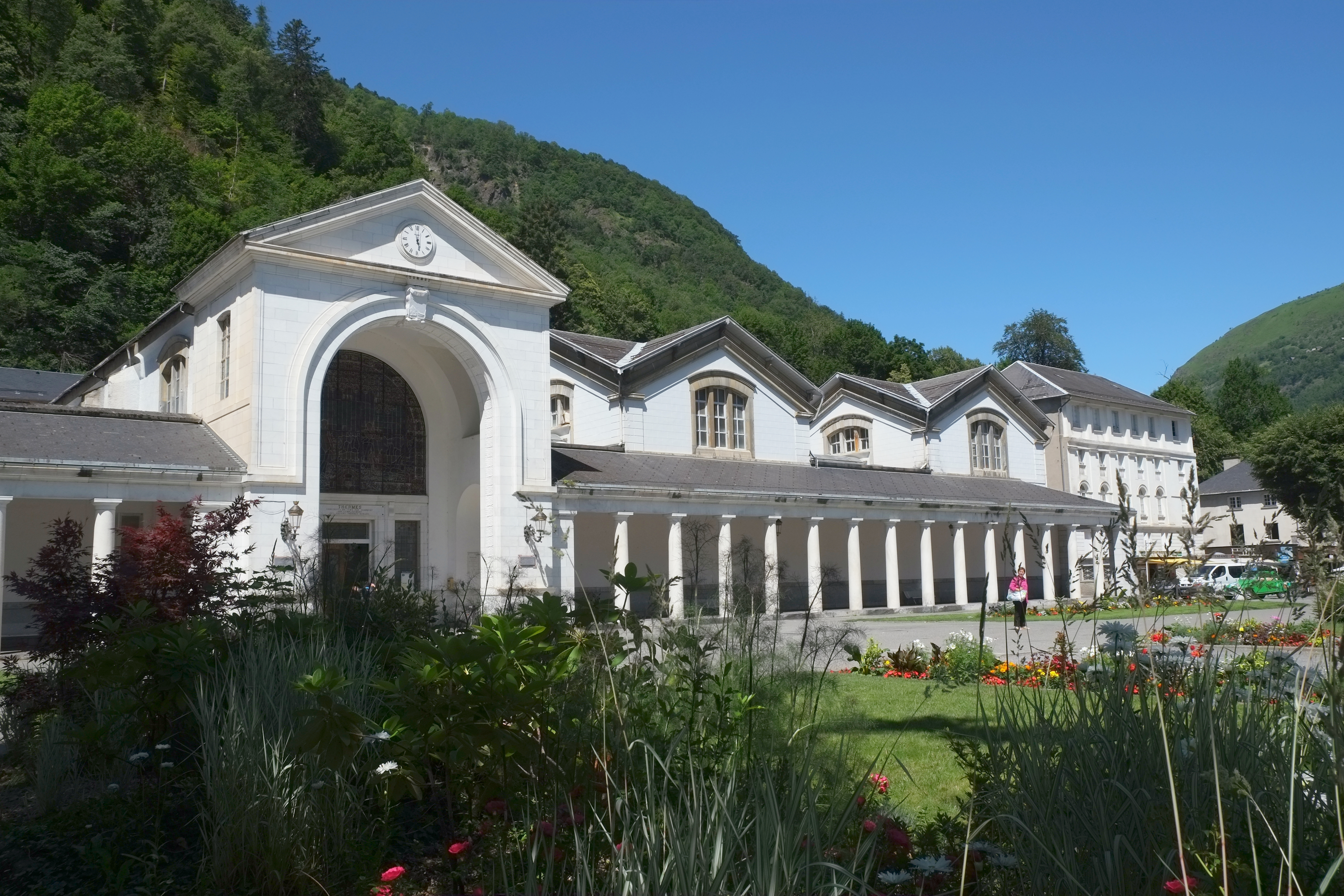 Kurhaus in Bagnères-de-Luchon im Département Haute-Garonne der Region Midi-Pyrénées (Frankreich)